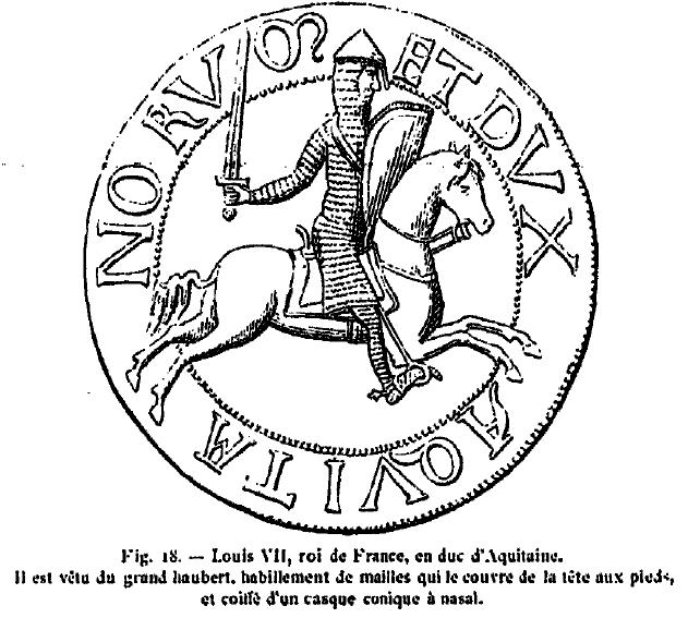 Gravure représentant le contre sceau de Louis VII le jeune (1137-1180)